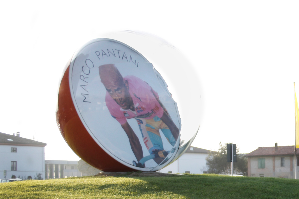 Biglia di Pantani Autore: Alessandra Andrini Luogo: Imola, accanto all’Autostrada Adriatica